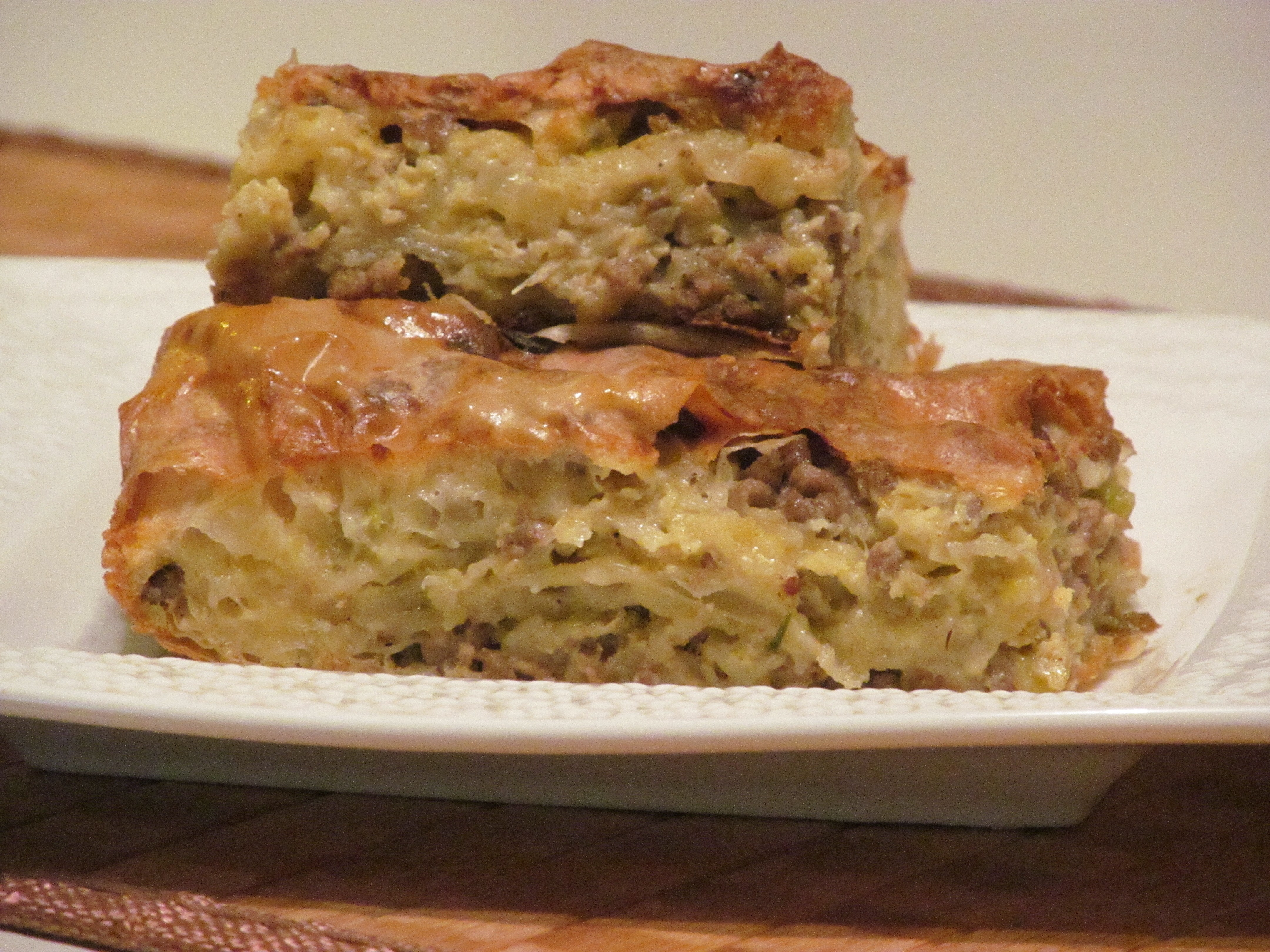 Recept za pitu sa mesom pogledajte na sajtu Serbian meat pie